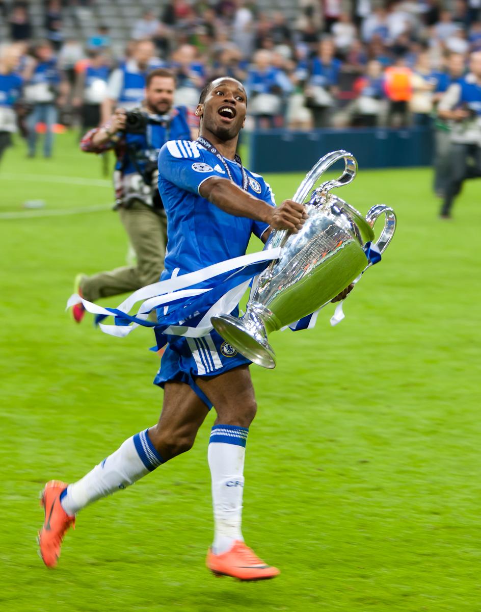 RA1_6722